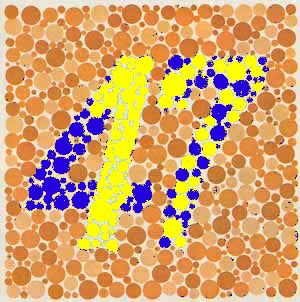 rg-Farbtafel Auflösung für Betroffene, die in 47-rg12.jpg die Zahl 17 anstatt der Zahl 47 erkennen. Die betreffenden Felder wurden mit der Pipette-Funktion eines Grafikprogramms eingefärbt, sodass sie im Originalbild entsprechend zugeordnet werden können und der Sehschwache sieht, was er nicht sieht.